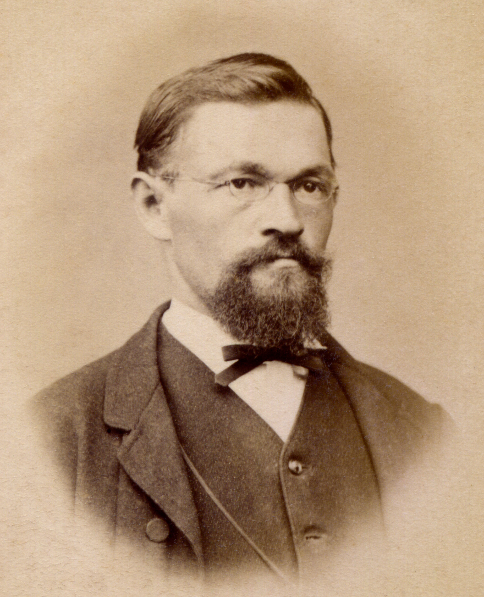 Das Foto von Carl Fischer (1841-1906) ist etwa 1885 aufgenommen worden. Es stammt aus dem Fotoalbum seiner Schwester Bertha Erbe geb. Fischer (1842-1911)